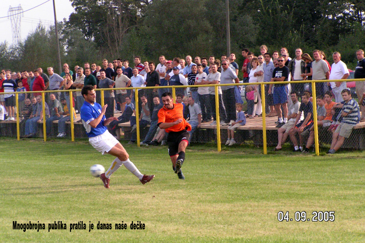 Nogomet u Mraclinu.